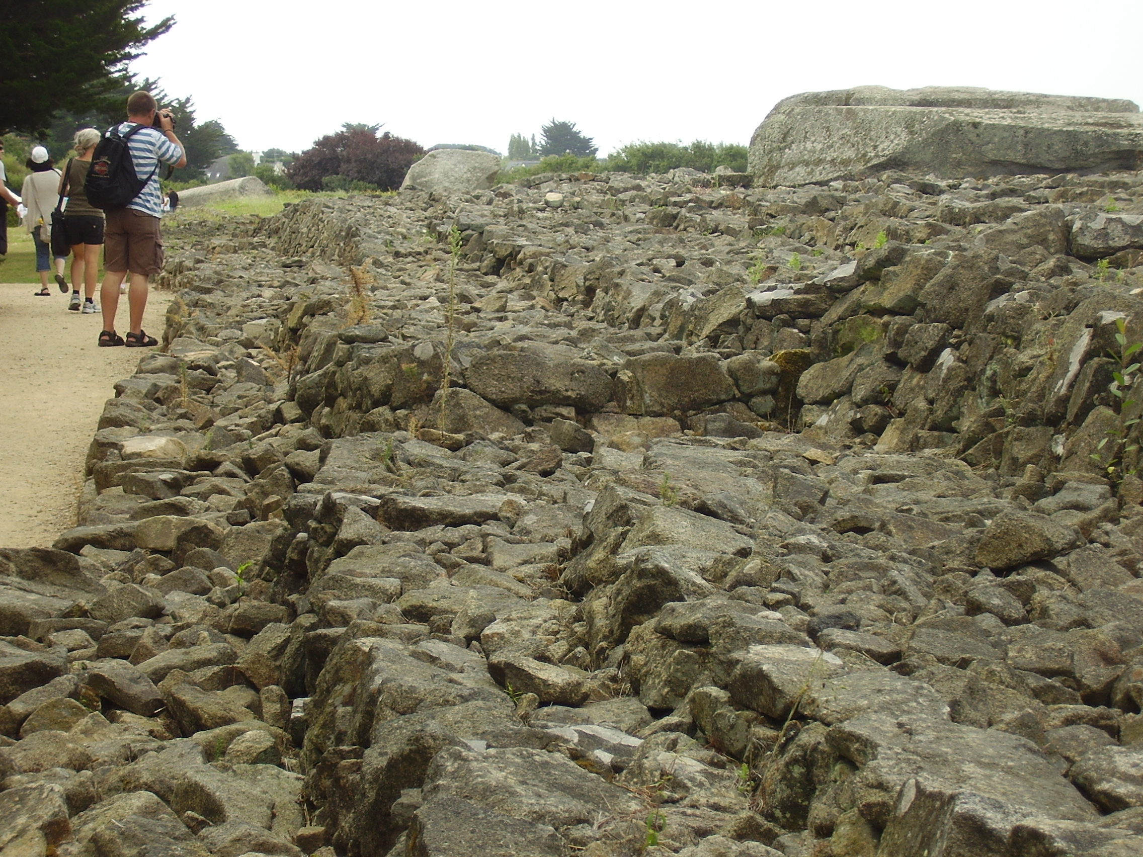 Locmariaquer, Frankreich